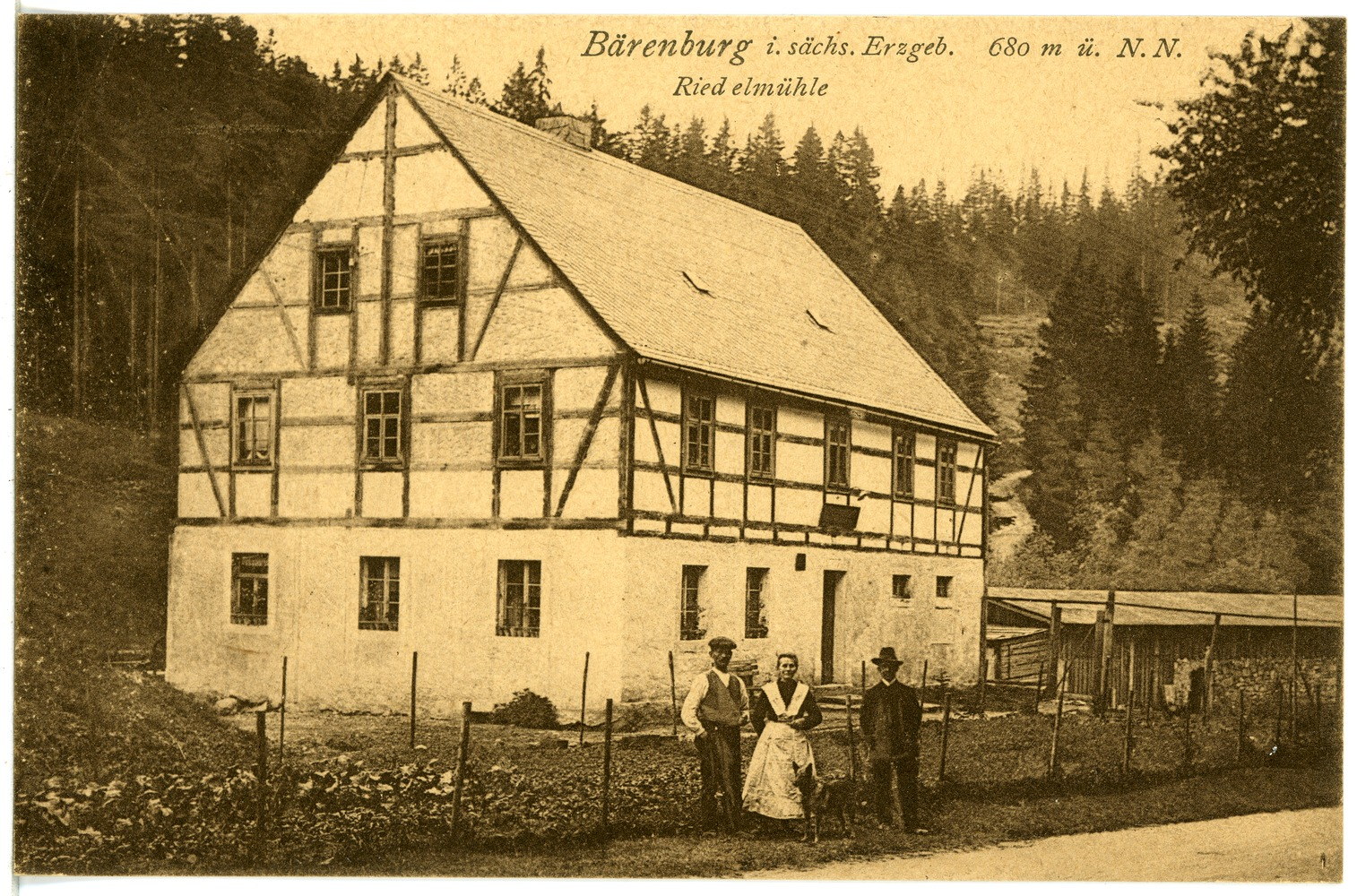 Bärenburg; Riedelmühle This postcard is from publisher Brück & Sohn in Meißen ( postcard has a unique number 21786 and is available in a higher resolution at the publisher. This images was uploaded in a cooperation project between Wikipedians and the publisher.